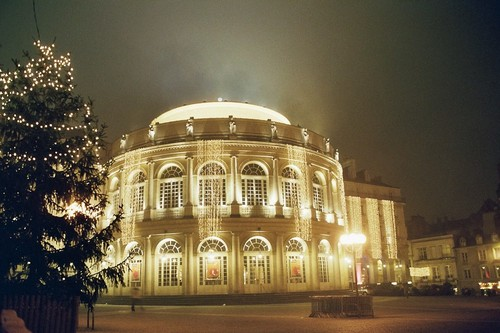 Opéra de Rennes, vue nocturne